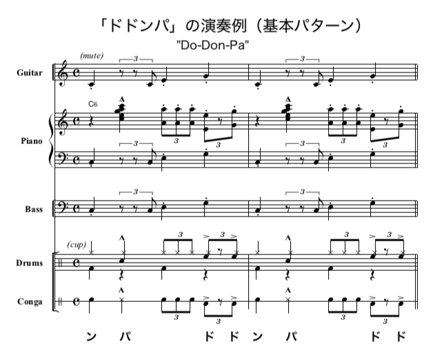 ドドンパ楽譜